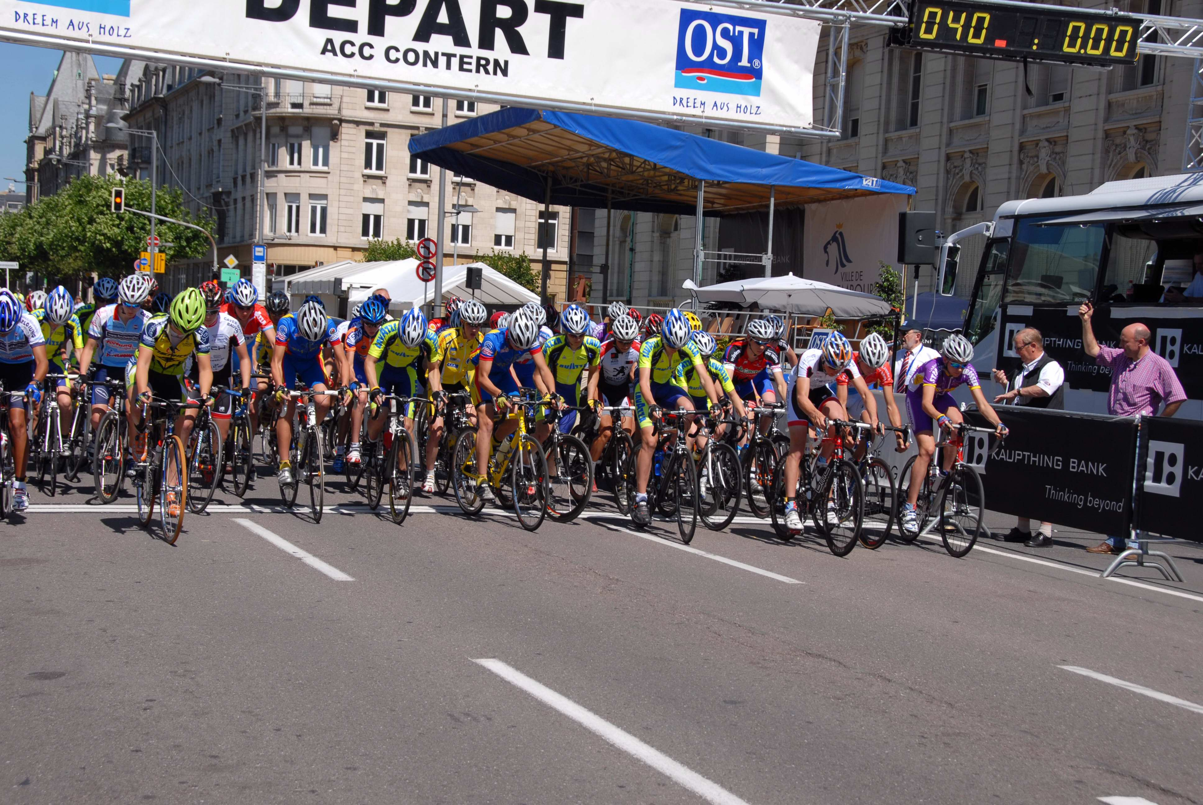 Den Départ vum Grand Prix François Faber 2007, Stad Lëtzebuerg.